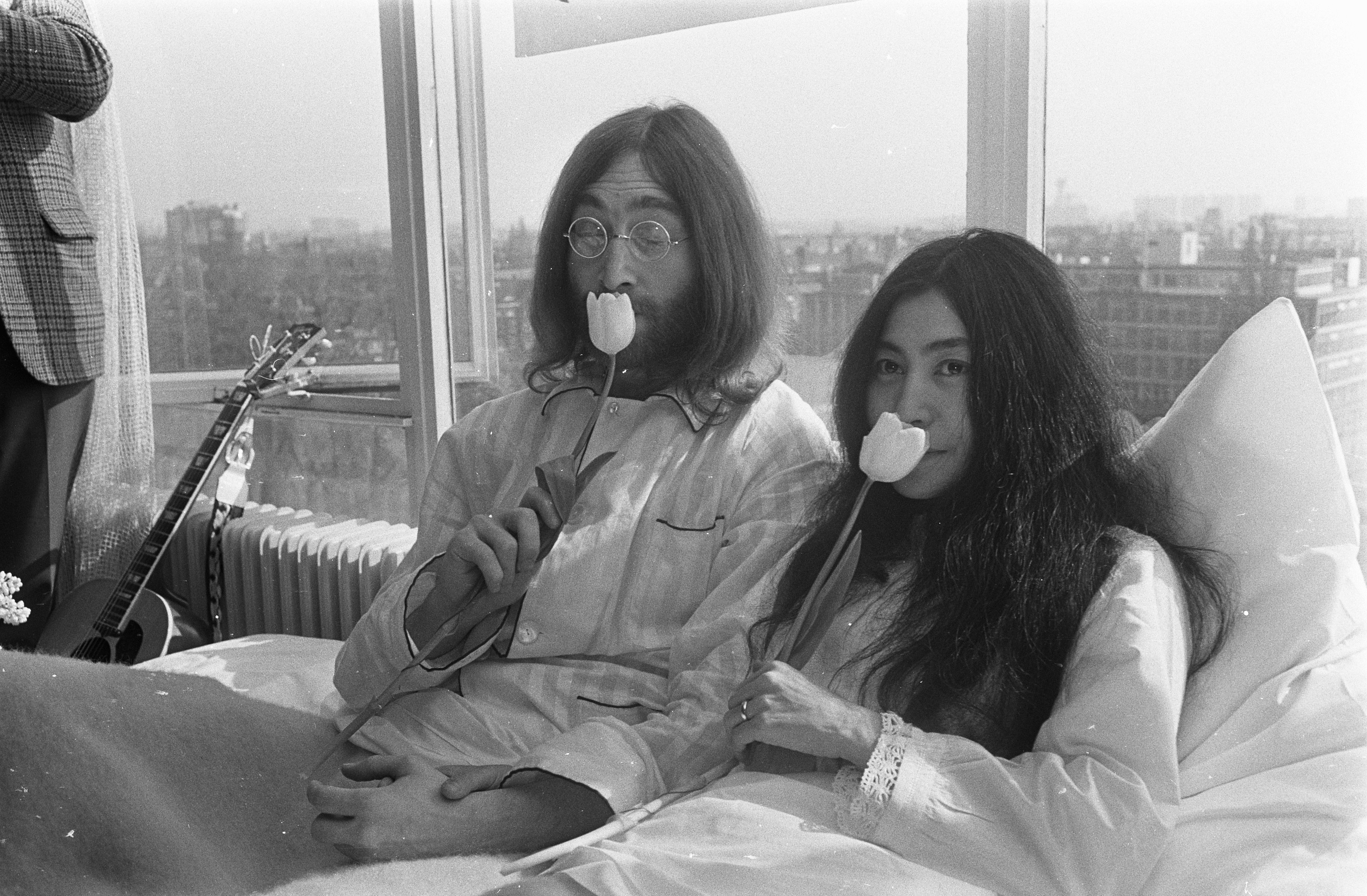 Collectie / Archief : Fotocollectie Anefo Reportage / Serie : [ onbekend ] Beschrijving : John Lennon en zijn echtgenote Yoko Ono op huwelijksreis in Amsterdam. John Lennon en Yoko Ono in bed in het Hilton Hotel Datum : 25 maart 1969 Locatie : Amsterdam, Noord-Holland Trefwoorden : hotels, huwelijksreizen, musici, muziek, zangers Persoonsnaam : Lennon, John, Ono, Yoko Fotograaf : Koch, Eric / Anefo Auteursrechthebbende : Nationaal Archief Materiaalsoort : Negatief (zwart/wit) Nummer archiefinventaris : bekijk toegang 2.24.01.05 Bestanddeelnummer : 922-2303